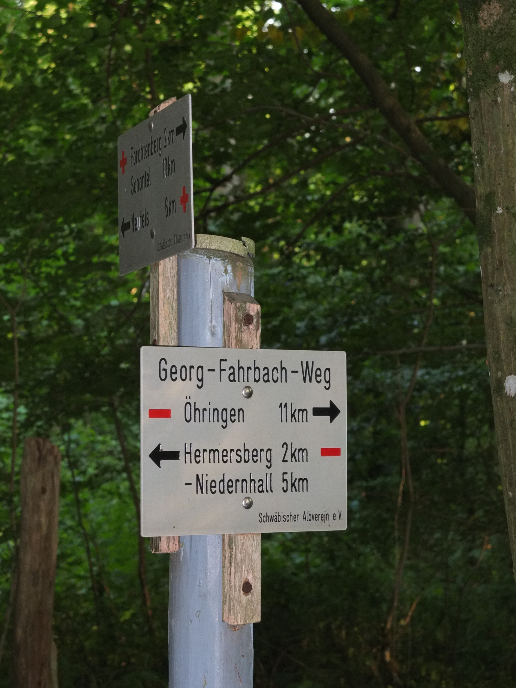 Wegweiserschild des Georg-Fahrbach-Wegs nahe dem Schwarzen Steg im Kupfertal bei Forchtenberg.